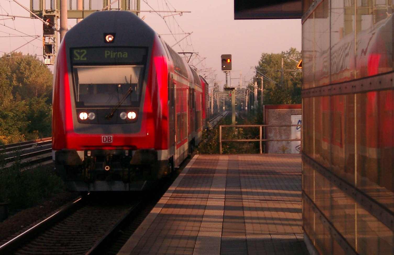 Haltepunkt Dresden Dobritz S-Bahn Linie 2